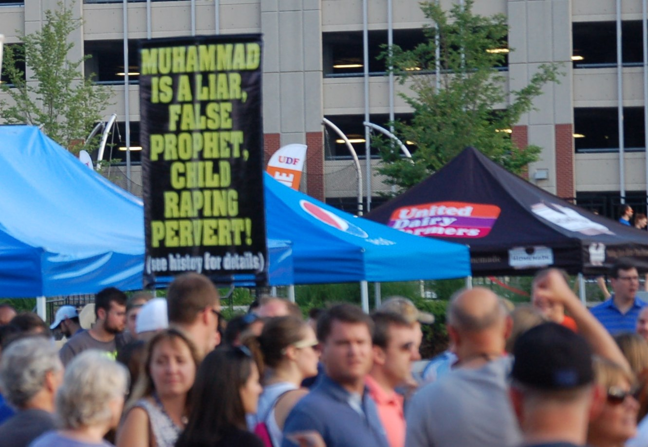 Anti-Muslim protestors